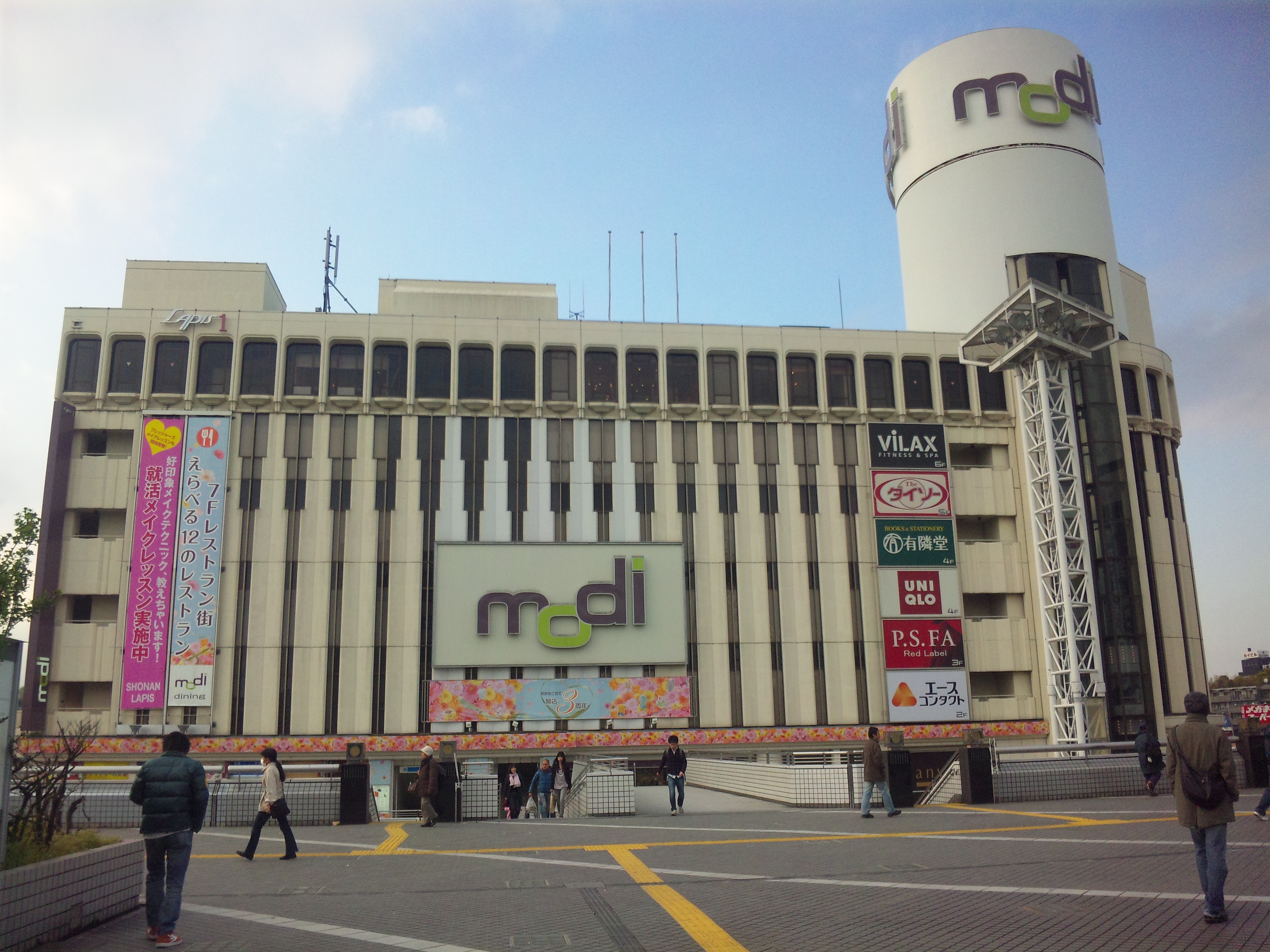 戸塚駅にて撮影。